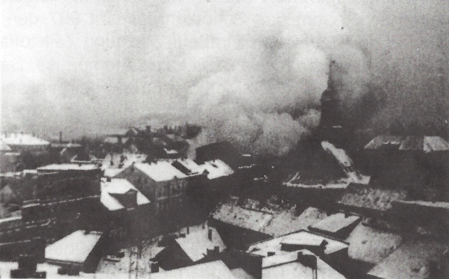 Fotografie von Tilsit bei der Eroberung durch die Rote Armee, rechts von der Mitte die ehem. Litauische Kirche